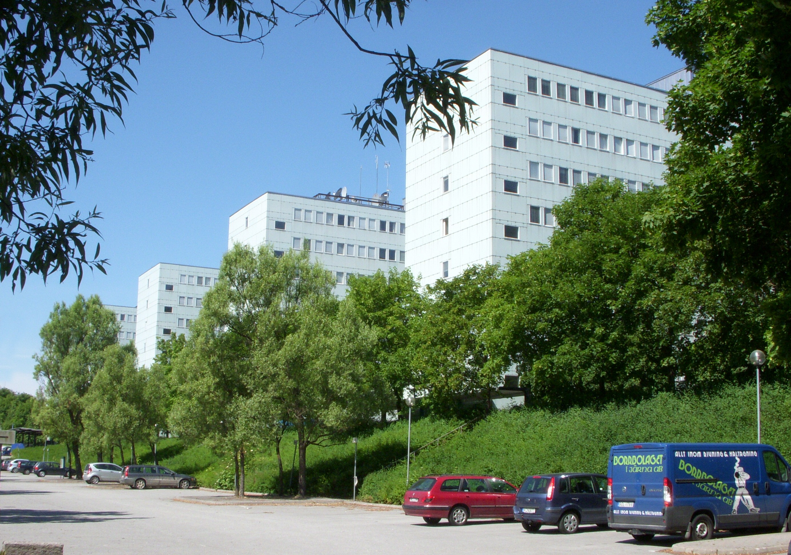 Södra huset, Stockholms universitet